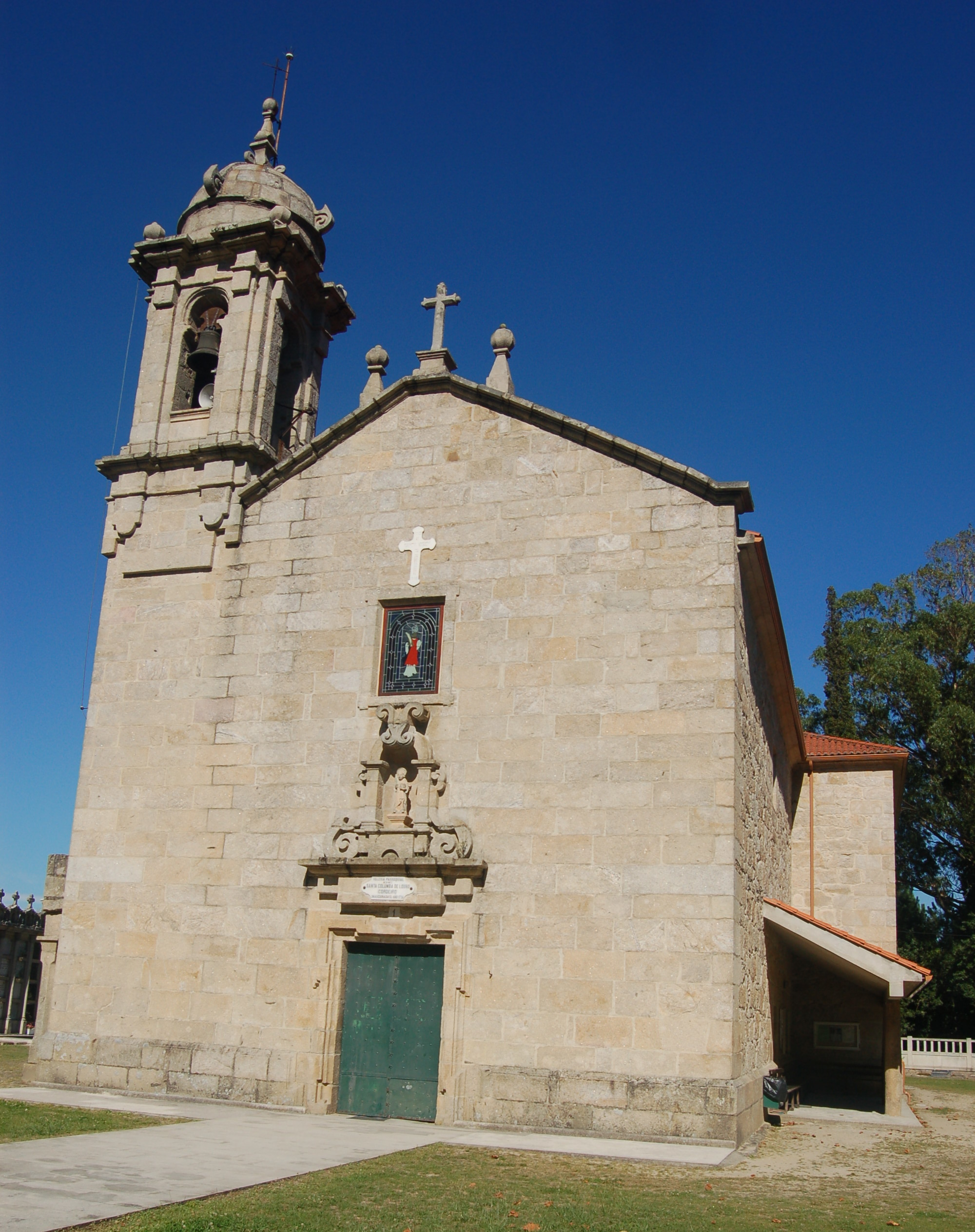 Igrexa parroquial de Santa Comba de Cordeiro (Valga)